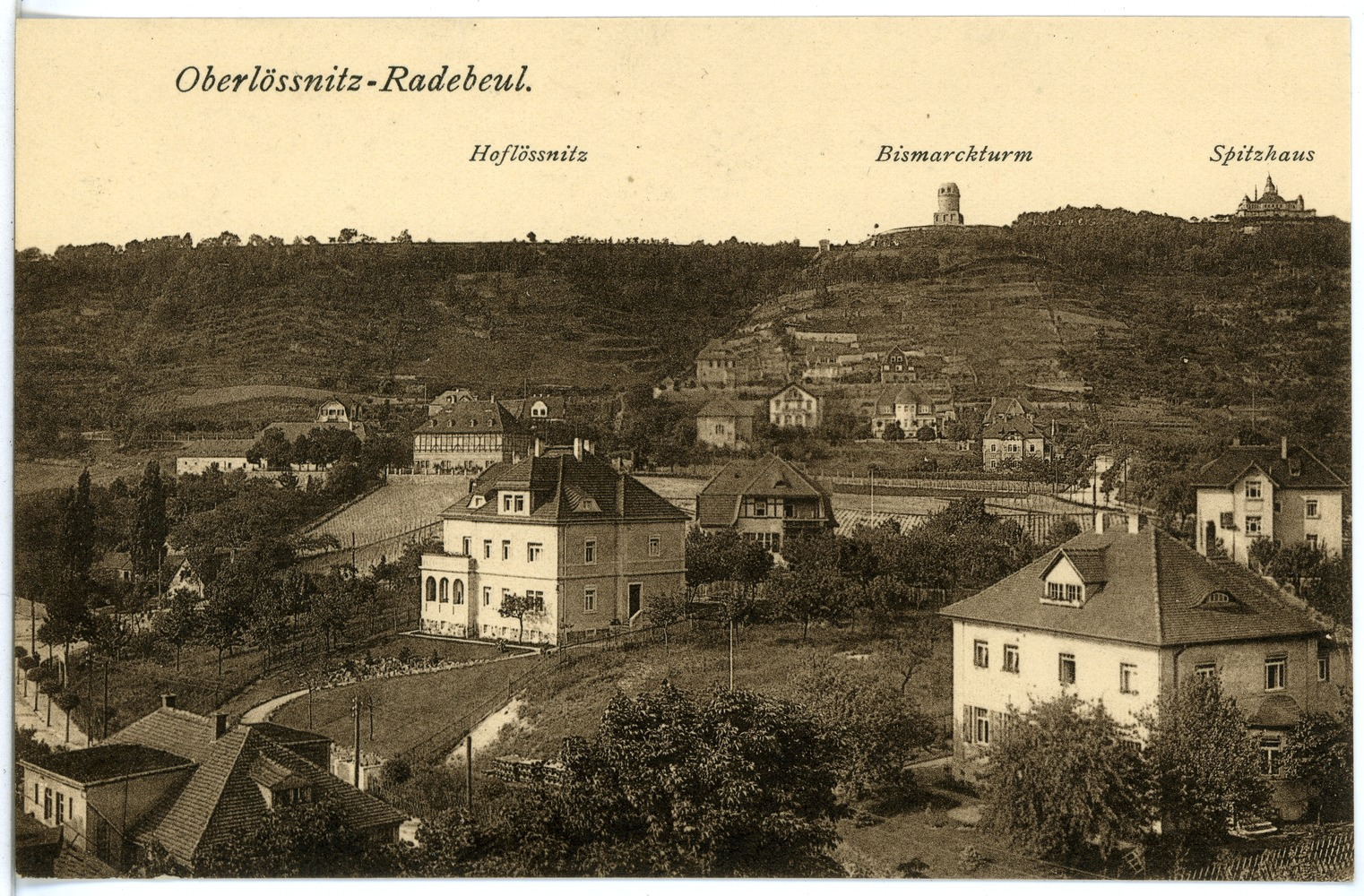 Radebeul; Hoflößnitz, Bismarckturm, Spitzhaus This postcard is from publisher Brück & Sohn in Meißen ( postcard has a unique number 17861 and is available in a higher resolution at the publisher. This images was uploaded in a cooperation project between Wikipedians and the publisher.